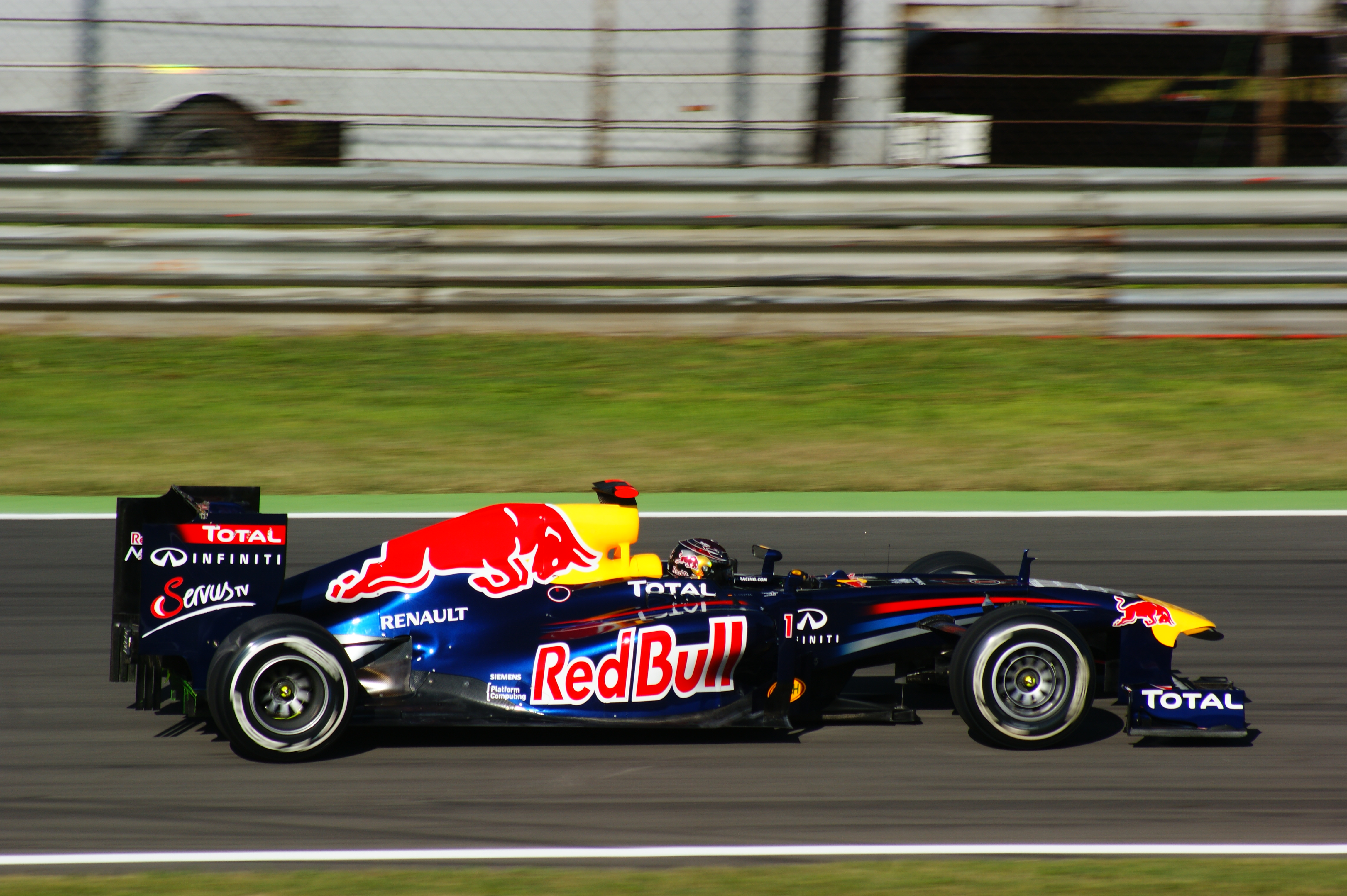 Sebastian Vettel alla prima variante Monza 2011